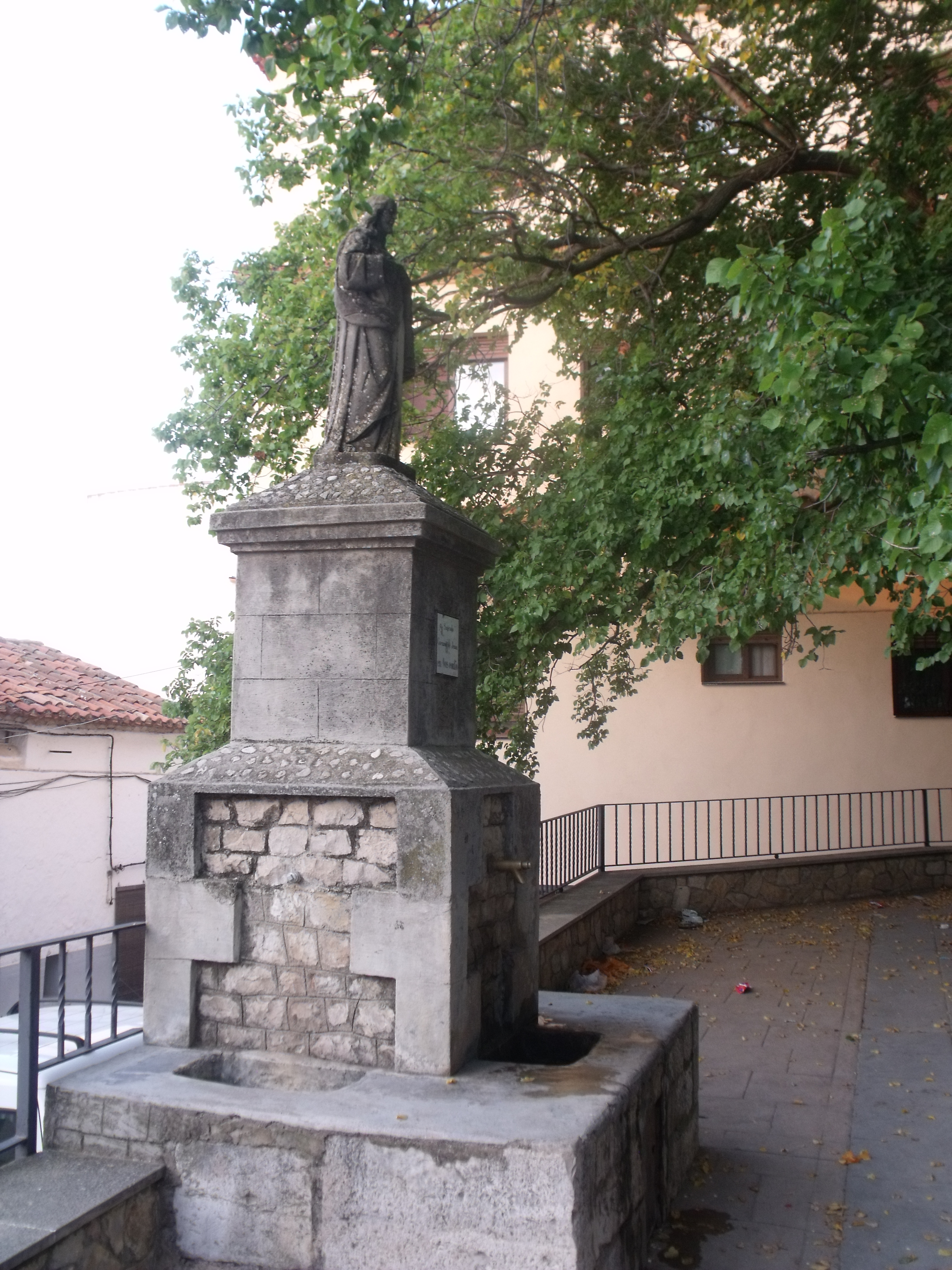 Font de la Plaça de la Setena.